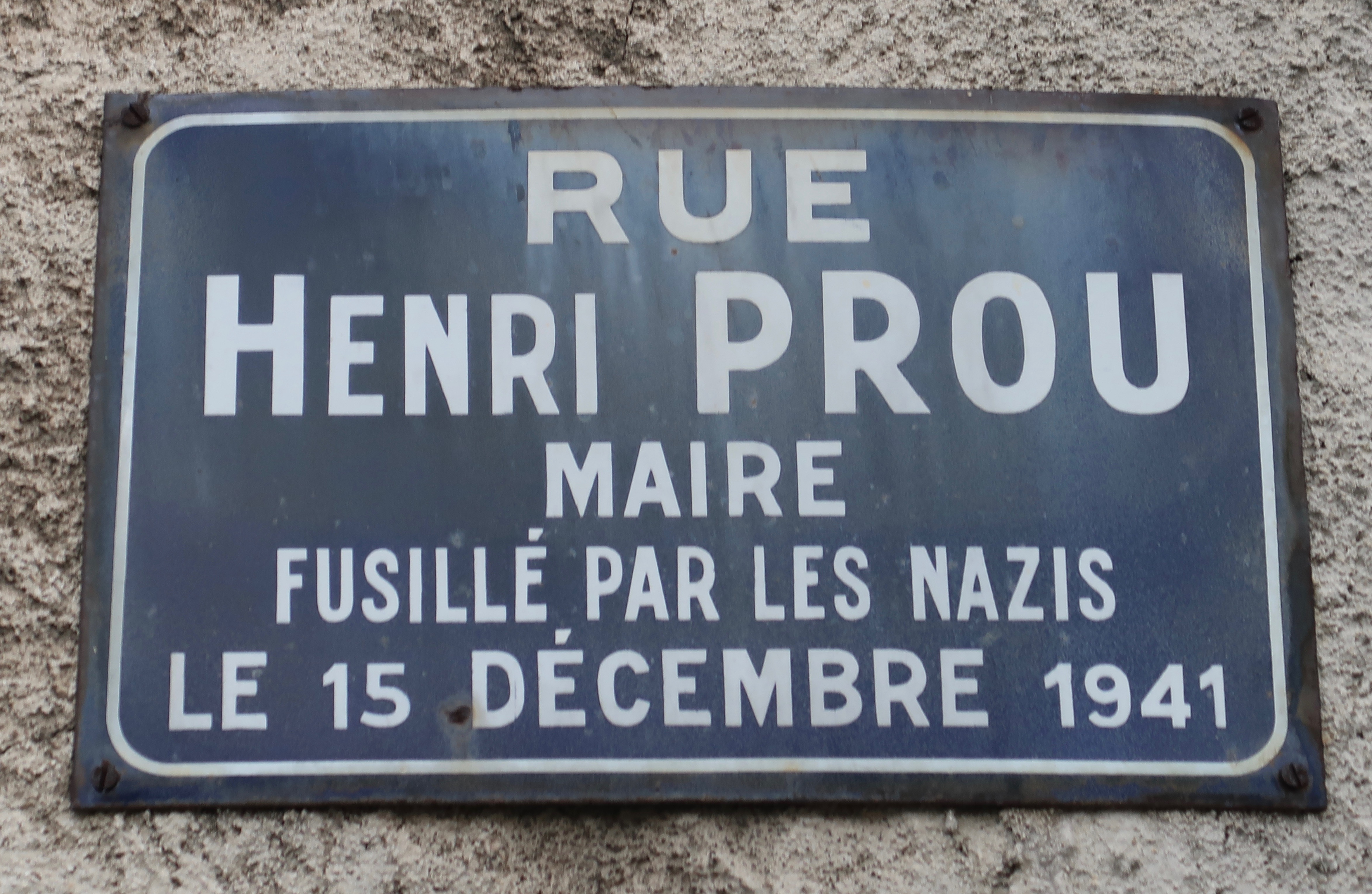 Plaque de la rue Henri-Prou, Les Clayes-sous-Bois (Yvelines).